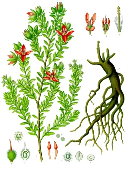 Ratanhia. A B Theile der Pflanze in natürl. Grösse; 1 Blüthe ohne Kelch, vergrössert; 2 dieselbe ohne Kelch- und Kronenblätter, desgl.; 3 Staubgefässe, desgl.; 4 Pollen, desgl.; 5 Stempel, desgl.; 6 Fruchtknoten im Längsschnitt, desgl.; 7 derselbe im Querschnitt, desgl.; 8 Frucht im Längsschnitt, desgl.; 9 u. 10 Same im Längs- und Querschnitt mit Würzelchen, desgl.; 11 mit Wiederhaken besetzte Stachel, desgl.